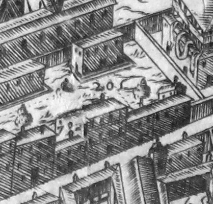 Pianta del buonsignori, dettaglio 205 palazzo di firenzuola (palazzo giugni)